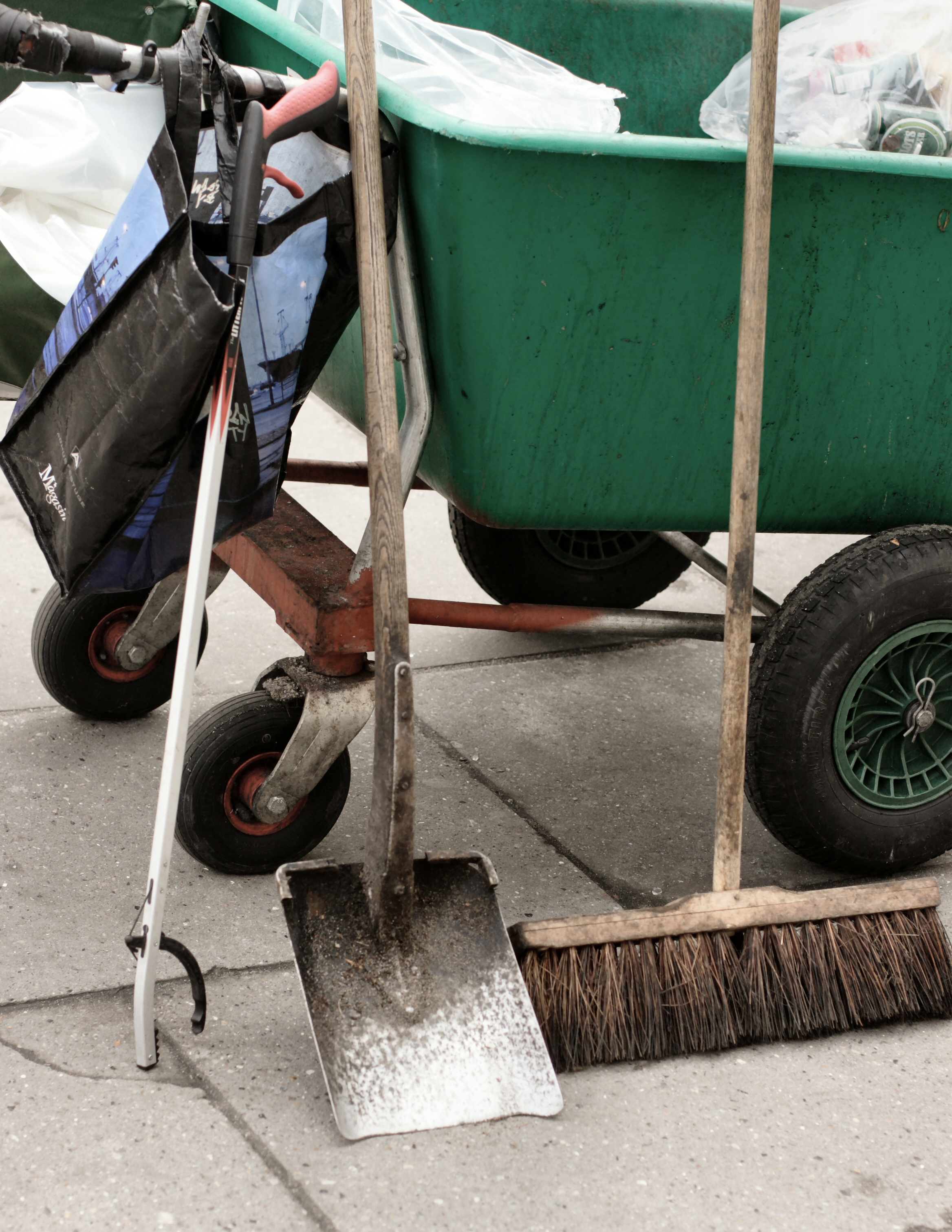 Gadefejerens værktøj